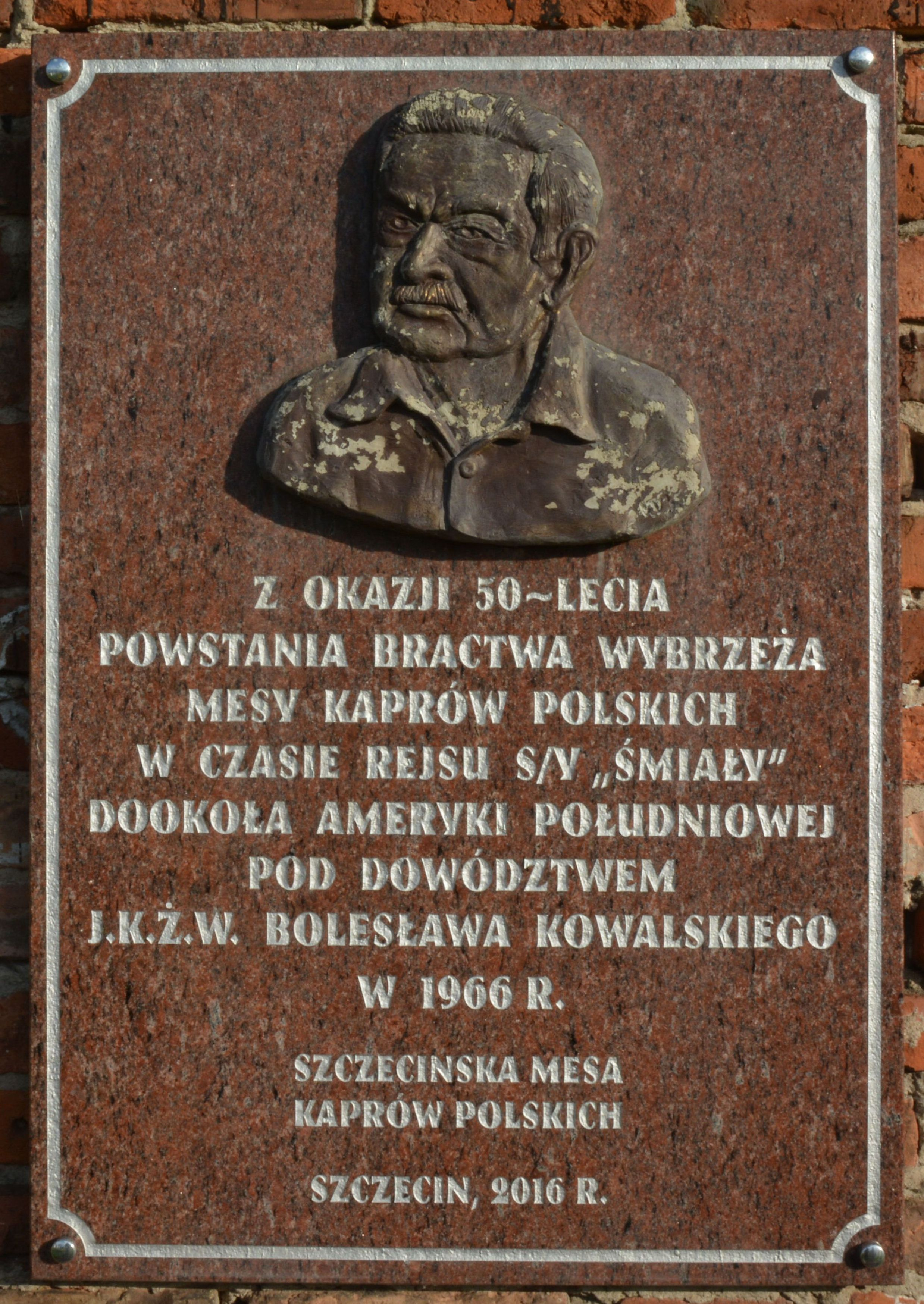 Tablica na Skwerze Kapitanów w Szczecinie (Łasztownia) poświęcona Bractwu Wybrzeża – Mesie Kaprów Polskich